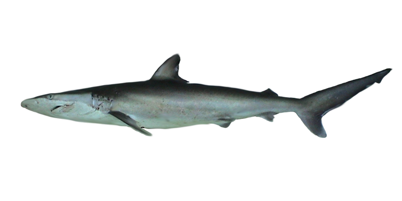 spinnershark